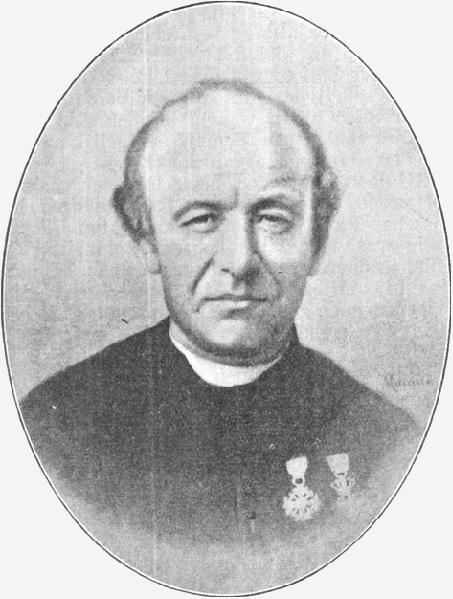 Foto uit maart 1889 door Gustave Macaire van de houtskooltekening die in maart 1889 vervaardigd werd door Hetu Macaire.